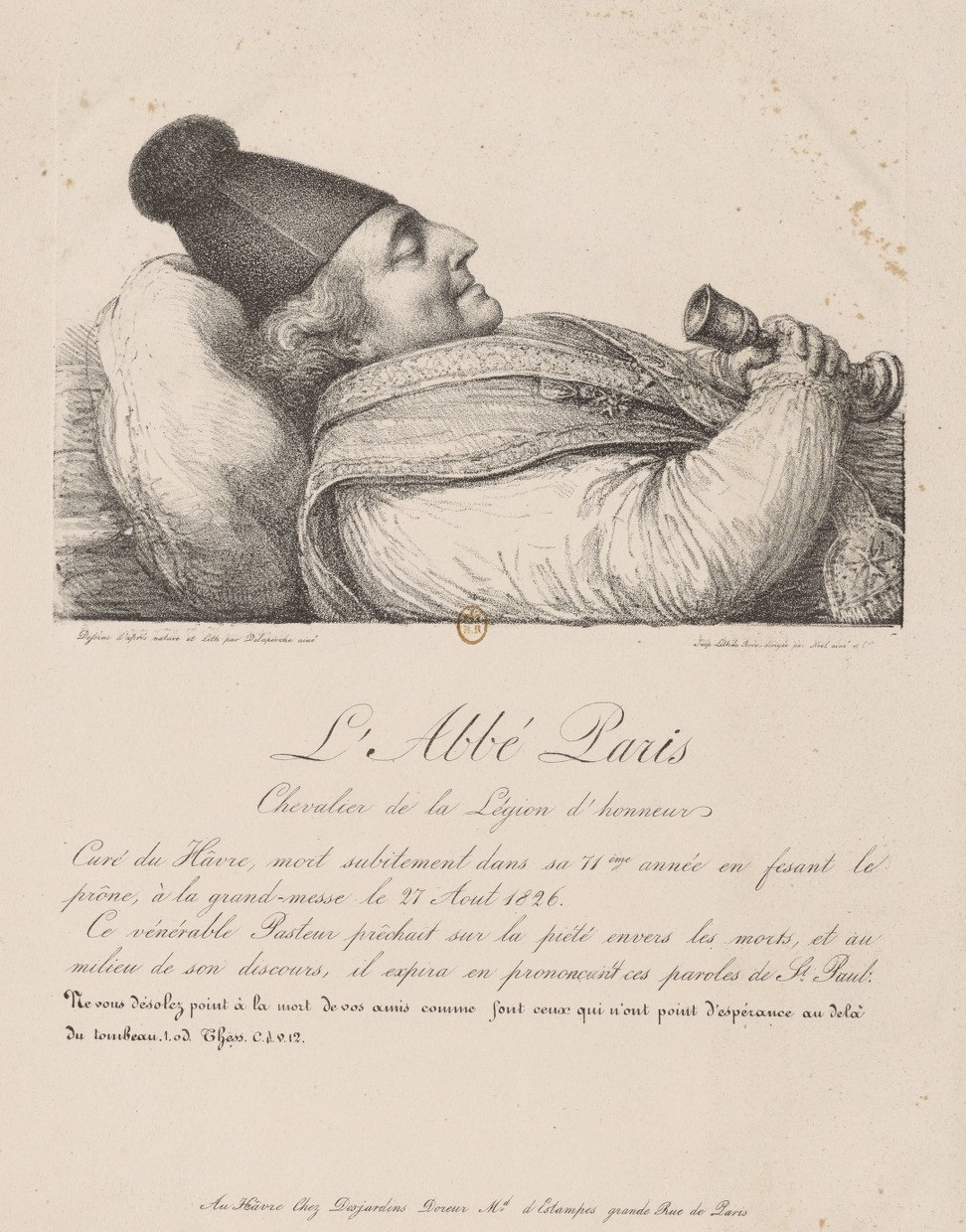 L'Abbé Paris, chevalier de la Légion d'honneur, lithographie (24,8 x 23,7 cm).